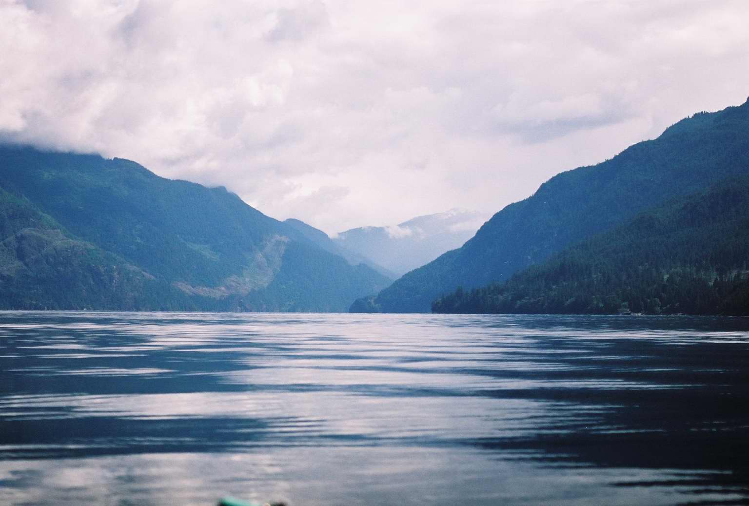 Trips '05 - Sechelt Inlet - 11